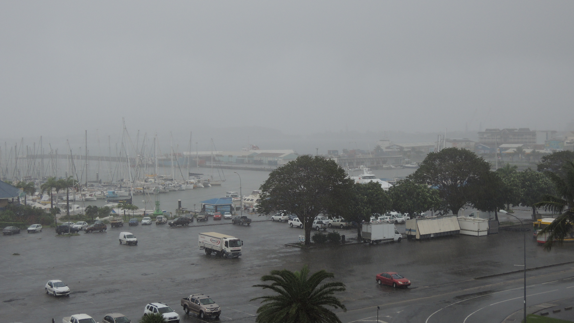 Nouméa sous la pluie - Baie de la Moselle